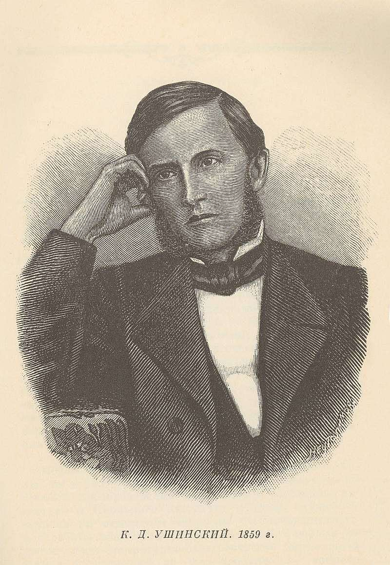 Ушинский К.Д. 1859 г. // Ушинский К.Д. Собр. соч. Т. 2